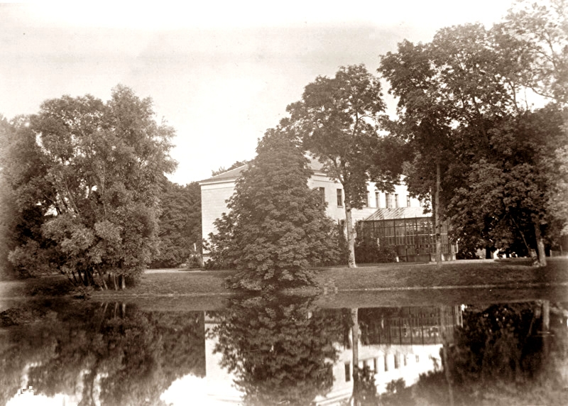 Herrenhaus Melkhof, um 1860, Fotograf August Mencke